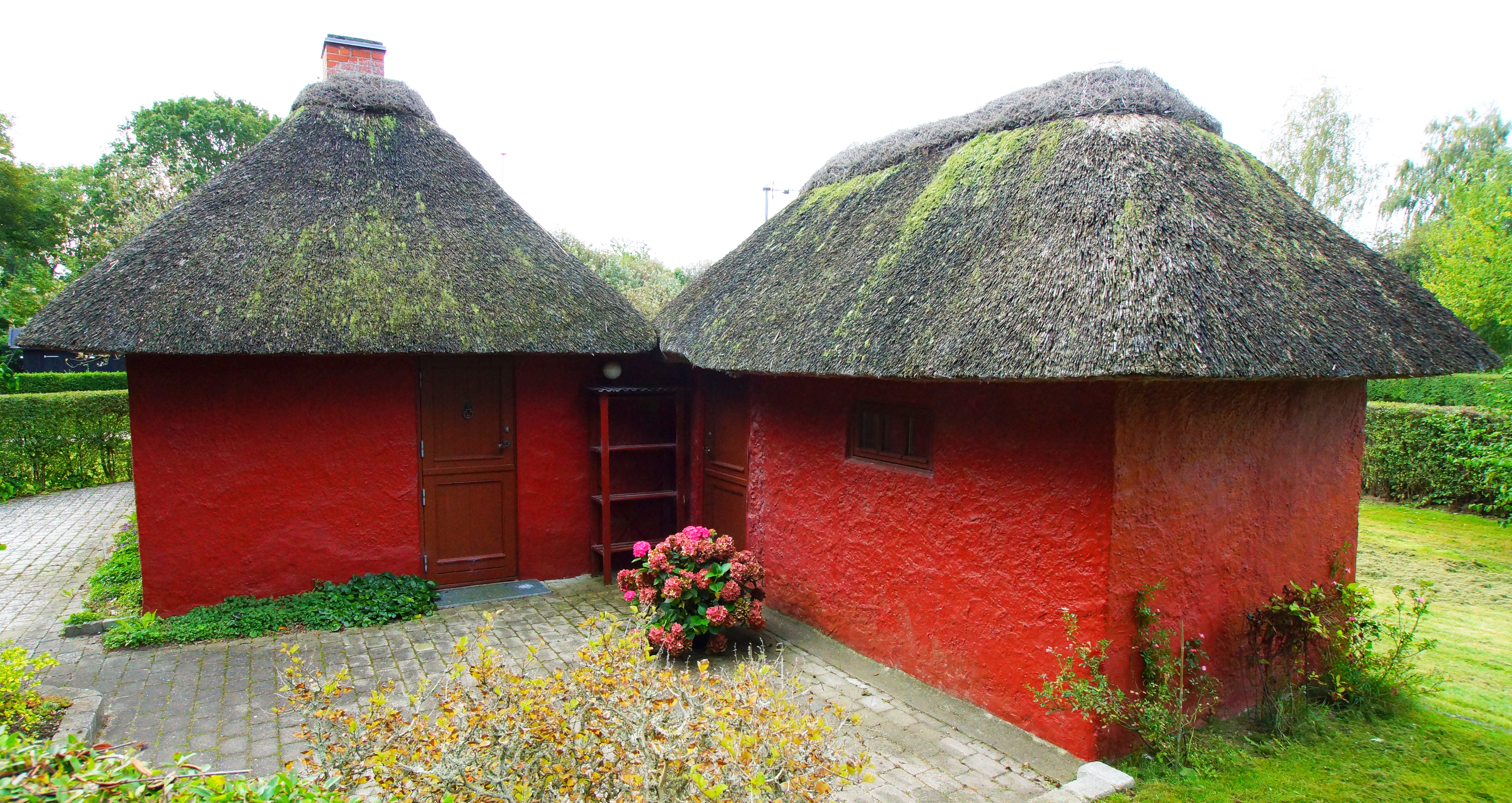 Egil Fischer arkitektur, Femmøller 5